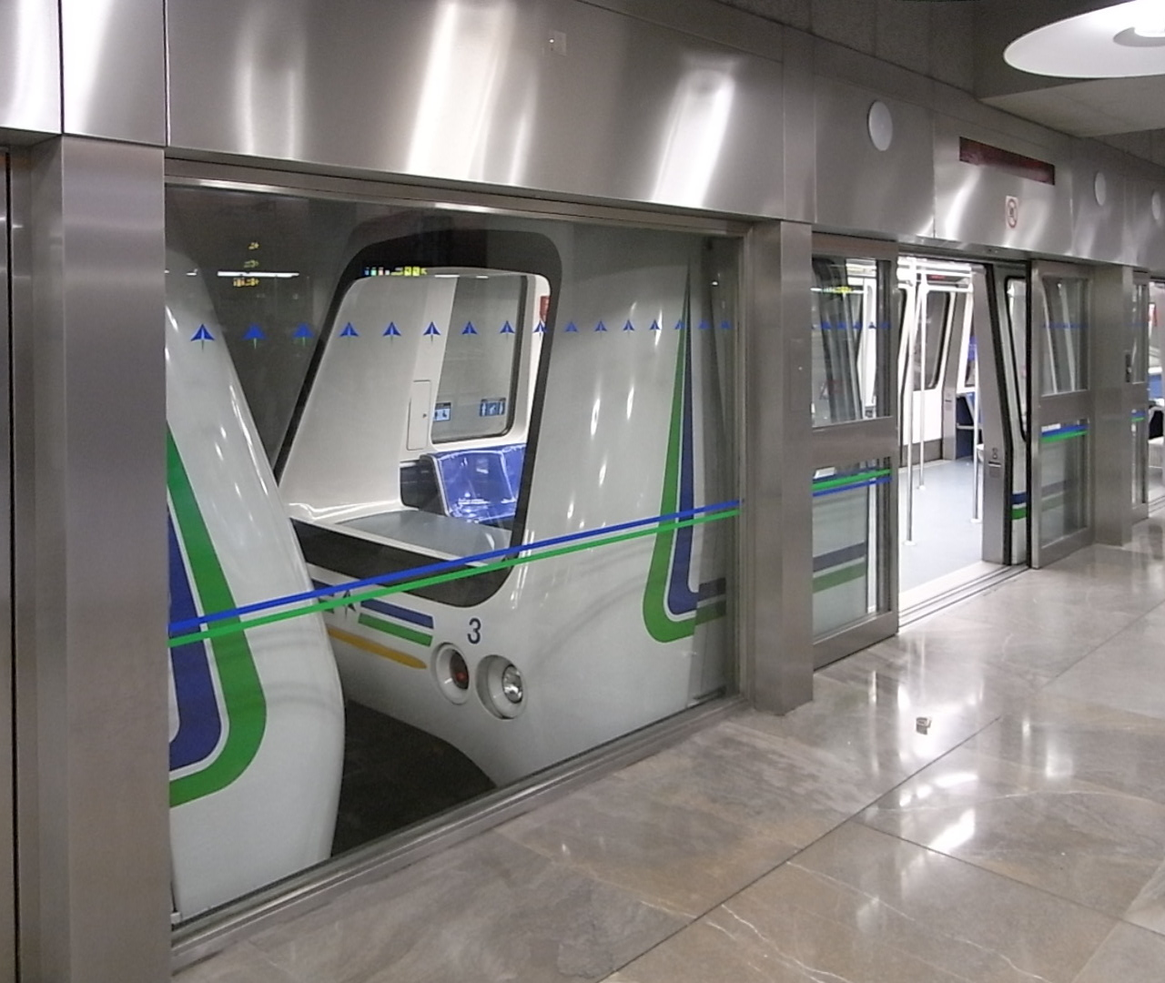 Automatische Flughafenbahn (APM) in Madrid-Barajas.